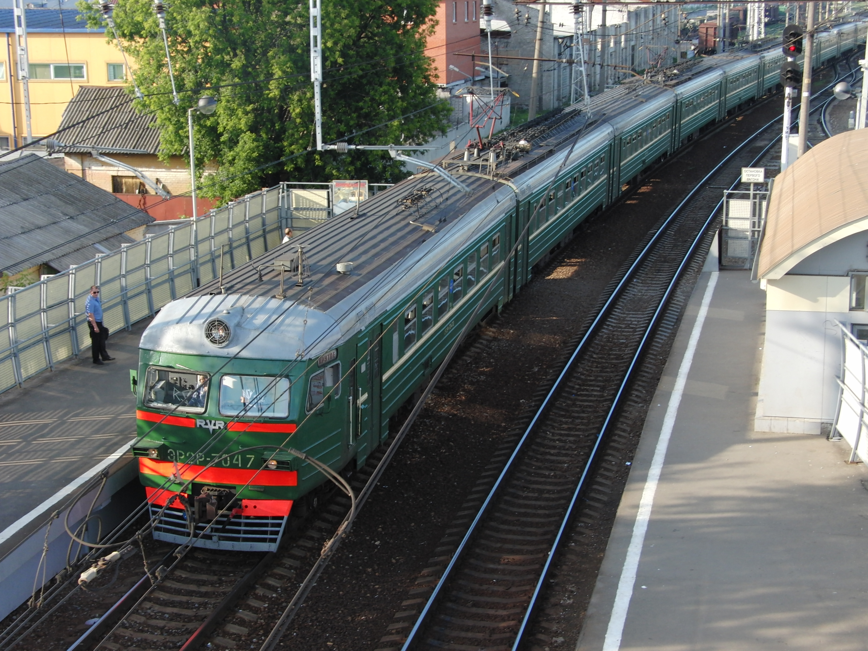 Orekhovo-Zuevo station, elektrichka (regional train) to Moscow